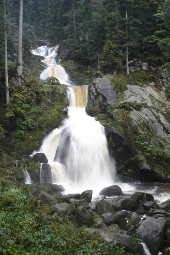 Triberg waterfalls